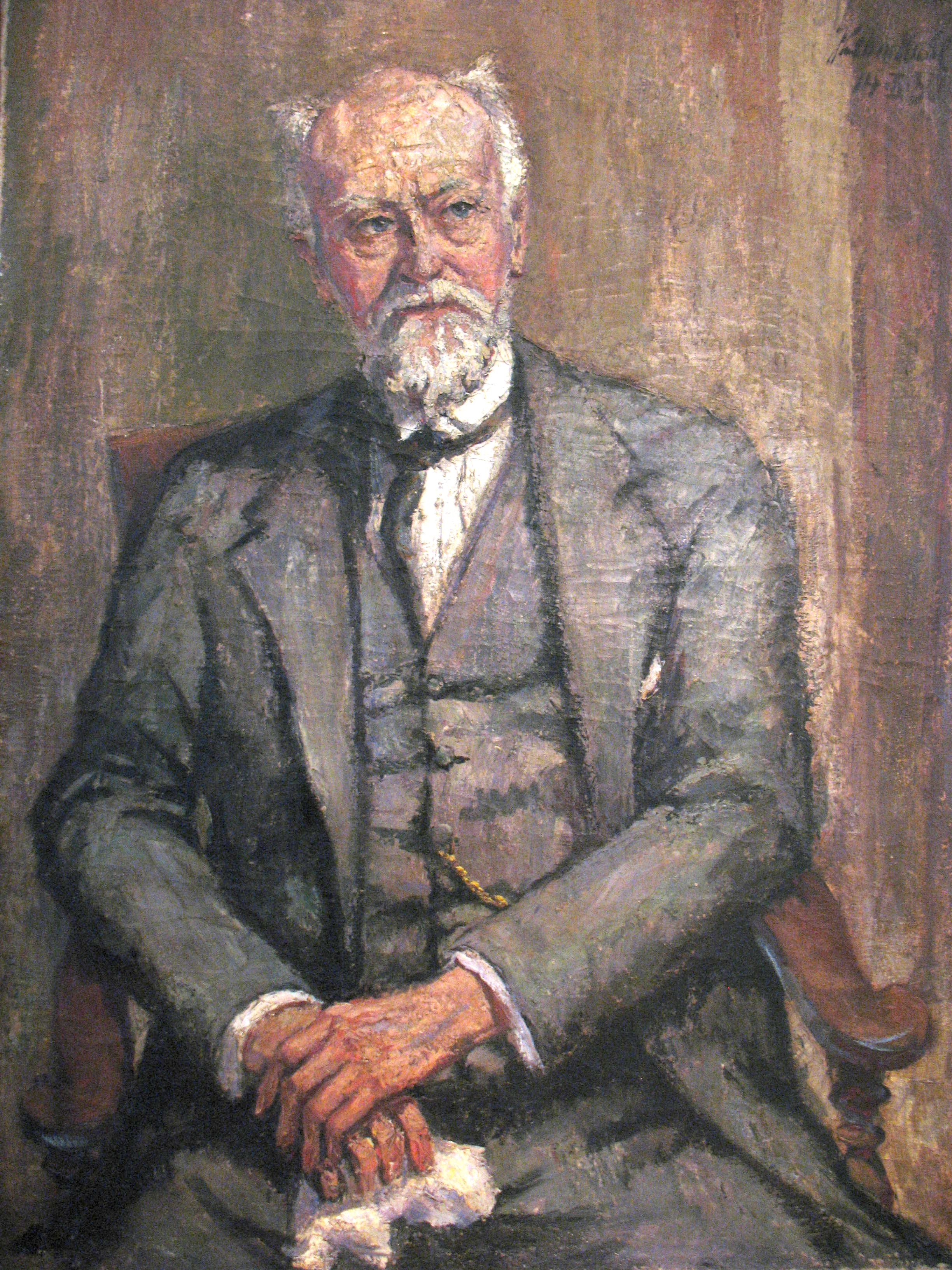 Gemälde von Ludwig Quidde, 1930 gemalt von Hans Lehmkuhl in München. Z.Zt. (2017) als Dauerleihgabe im Focke-Museum Bremen (Inv. 1998.074) ausgestellt